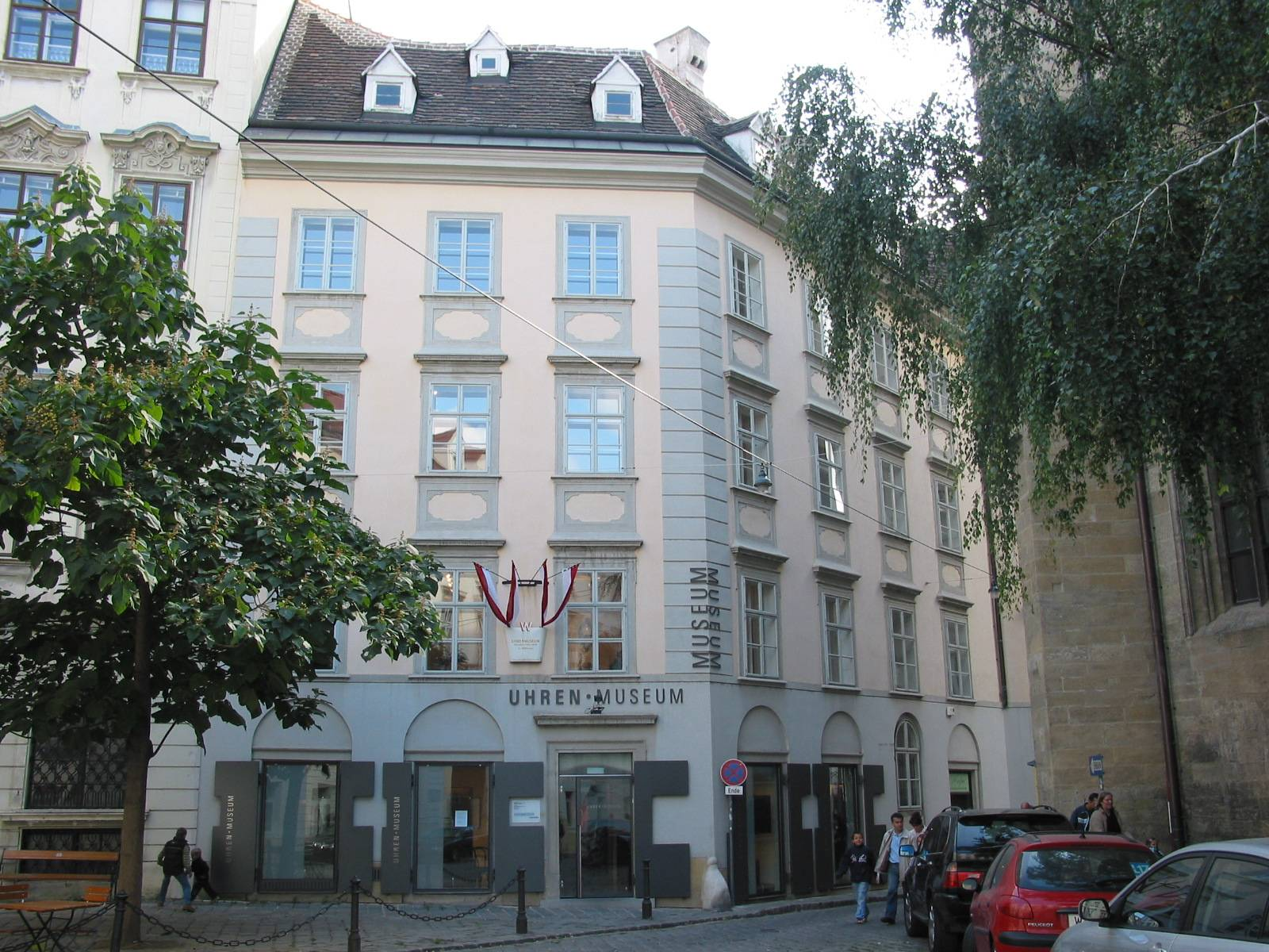 Palais Obizzi (Clock museum), Vienna, 2005-10-16 selfmade photo